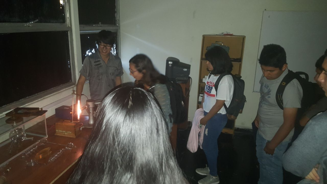 esta es una imagen de una de las areas del museo